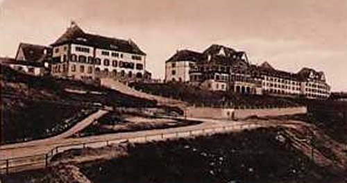 Dragoner Kaserne in Cannstatt